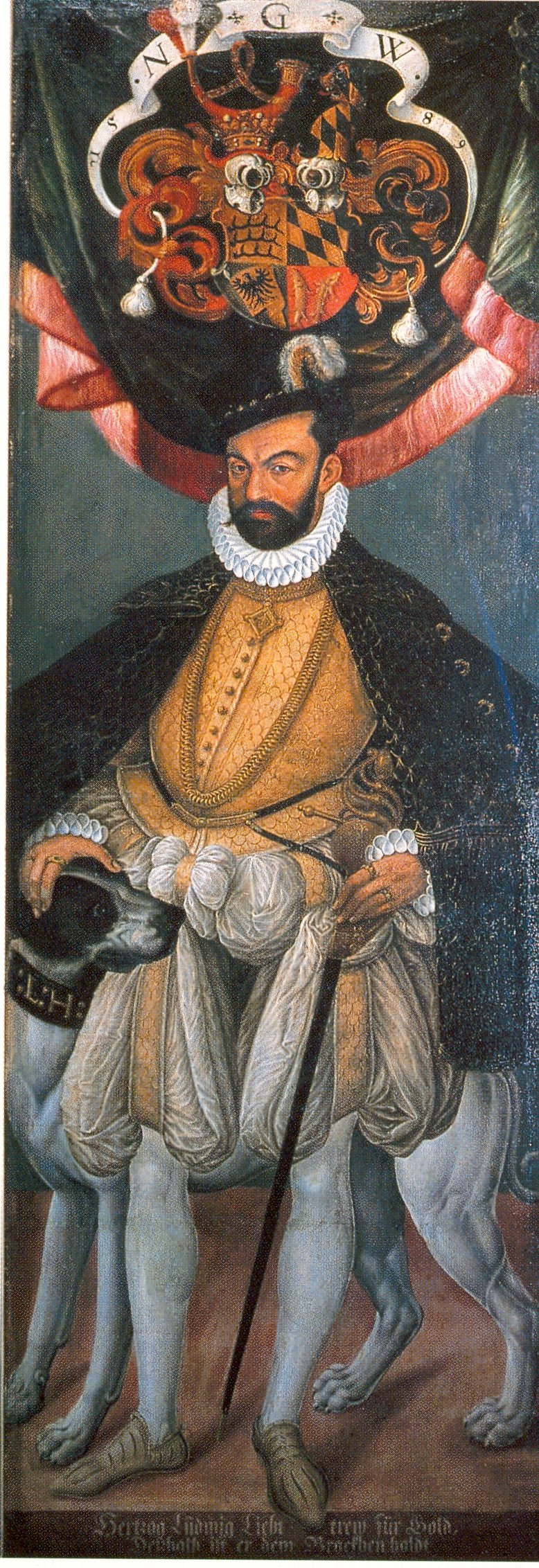 Herzog Ludwig I. von Württemberg (1.1.1554 - 8.8.1593)